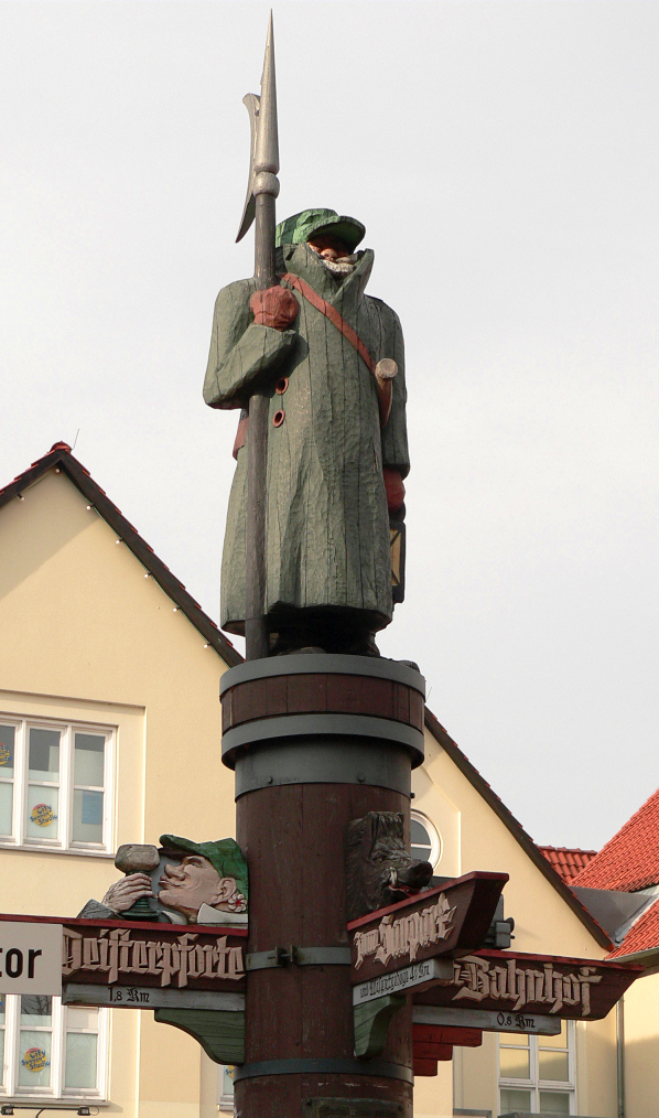 Wegweiserfigur in Springe